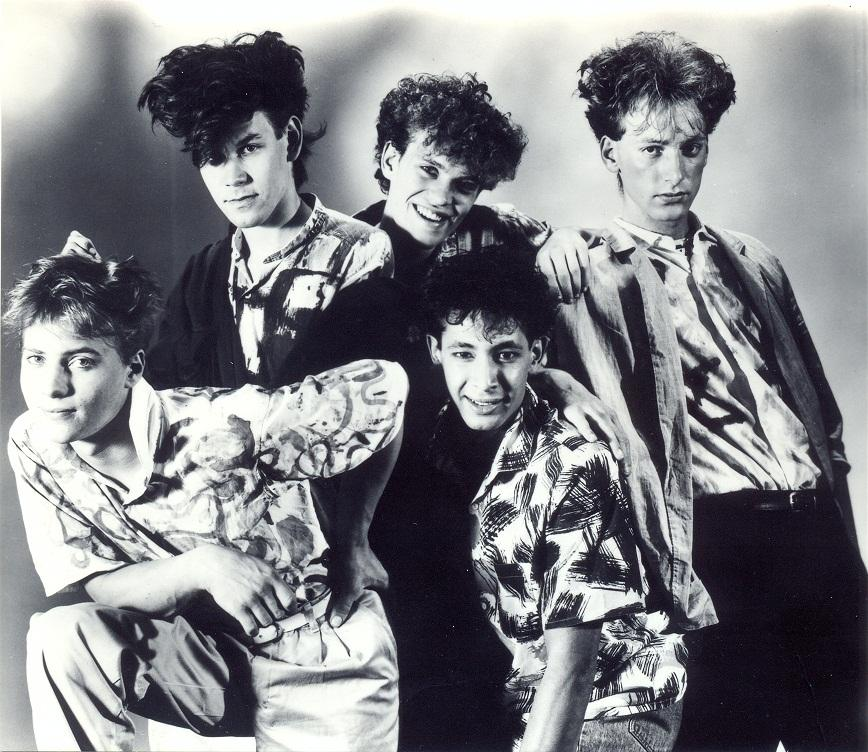 geen idee